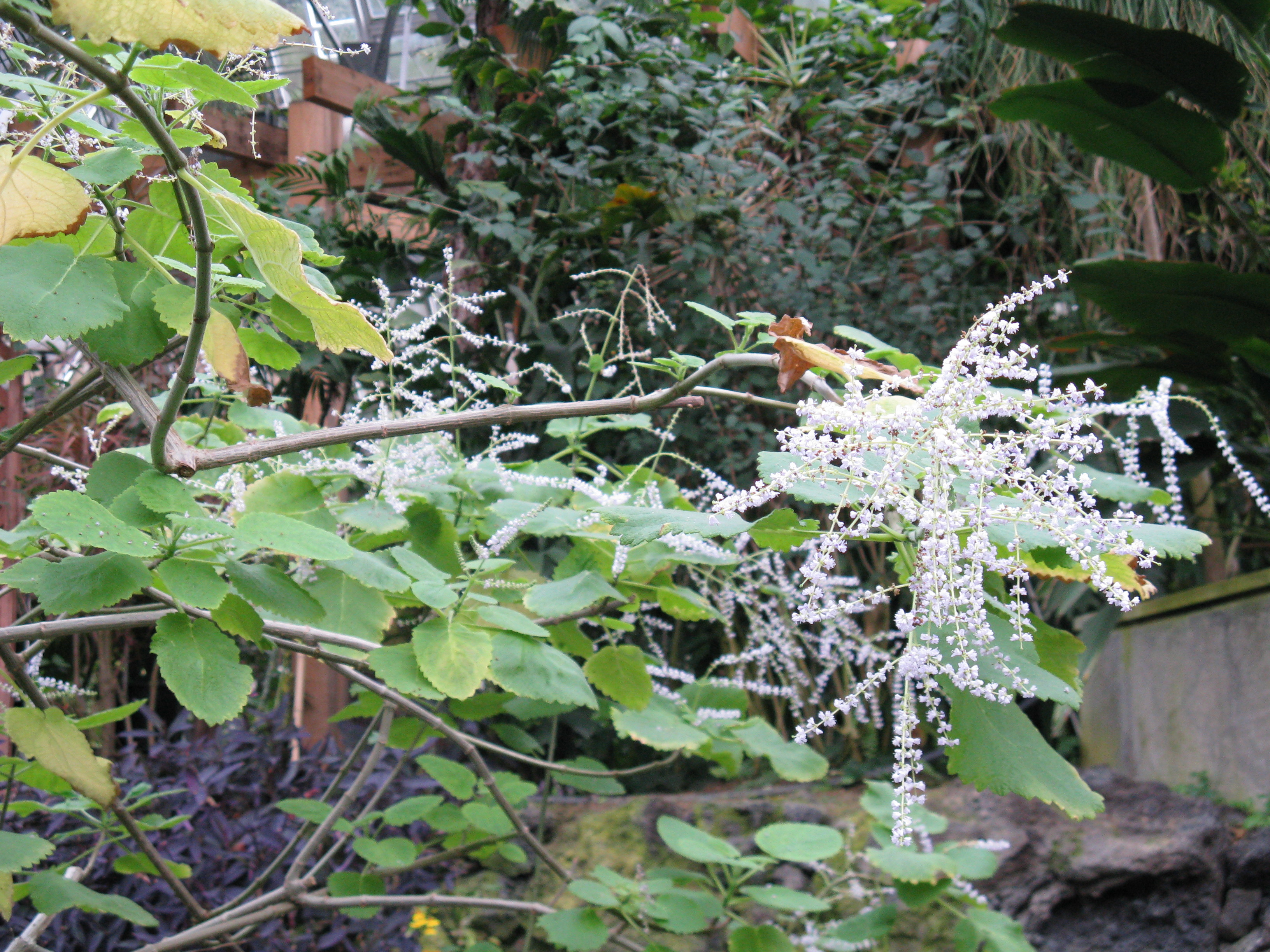 Scientific name Iboza riparia